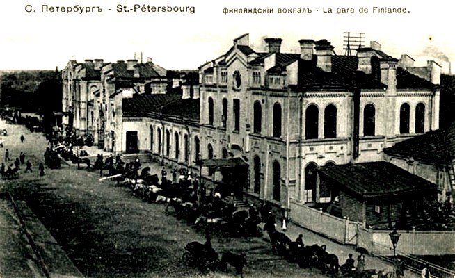 Финляндский вокзал в Петербурге. Открытка